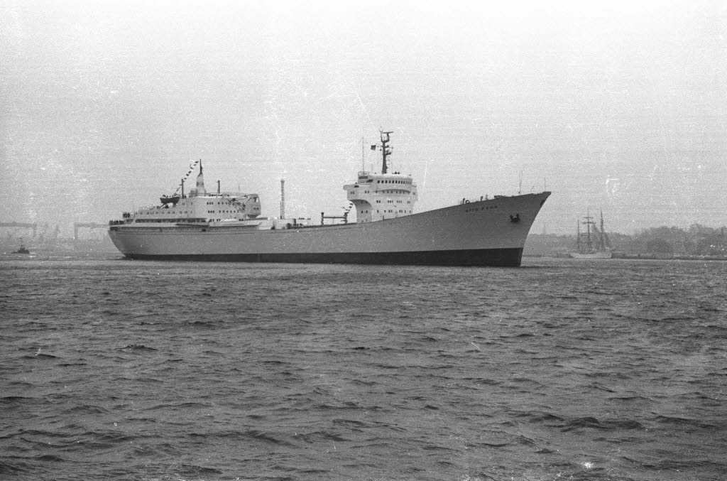 Übergabe des Frachters mit Atomantrieb.